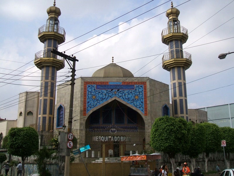 Mesquita do Brás, no bairro homônimo de São Paulo, Brasil.